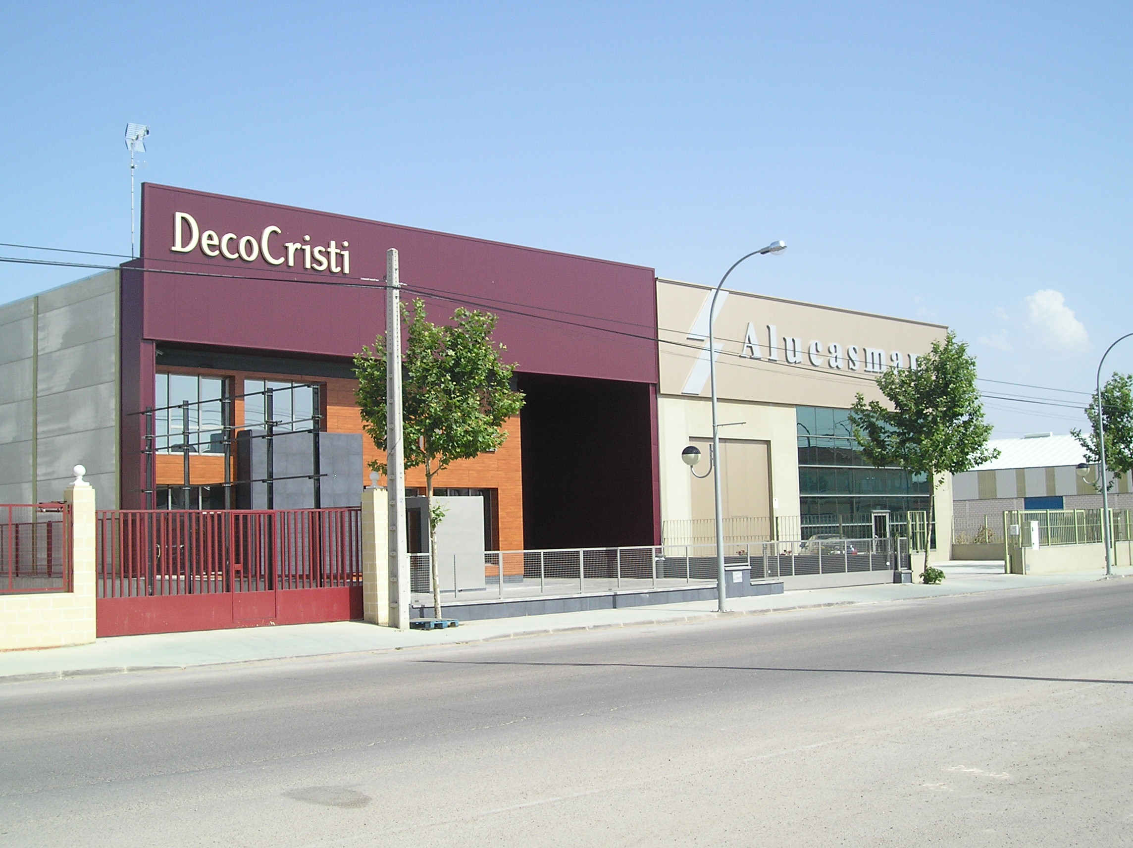 Deco Cristi y Alucasman. Una pequeña parte de las empresas pedroteñas.